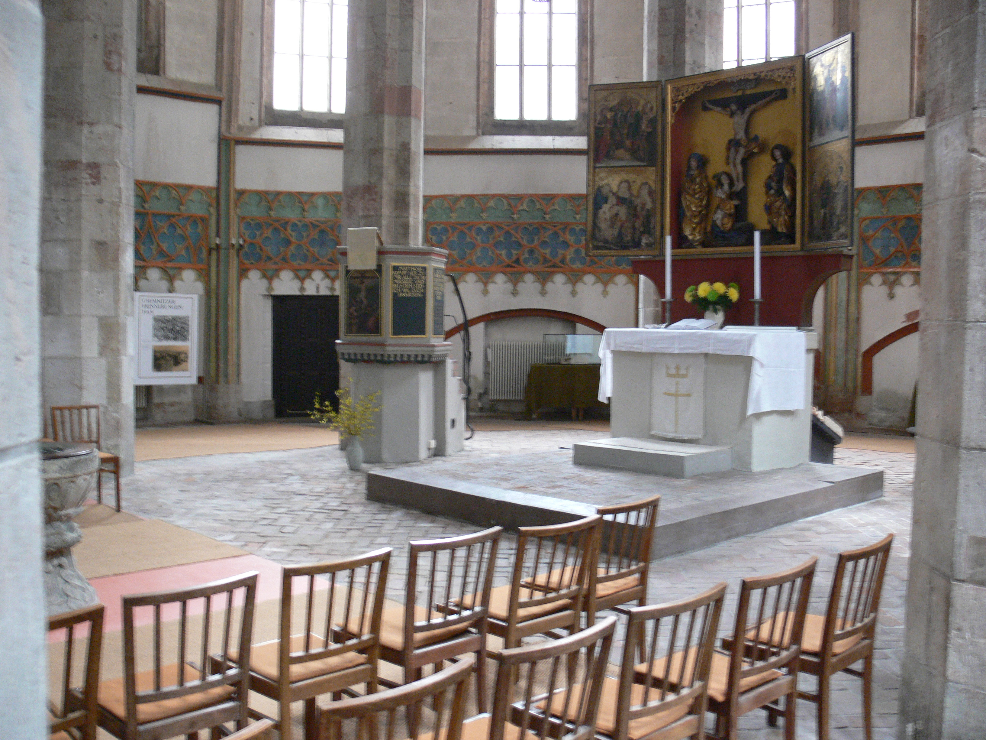 Stadtkirche St. Jakobi, Chemnitz